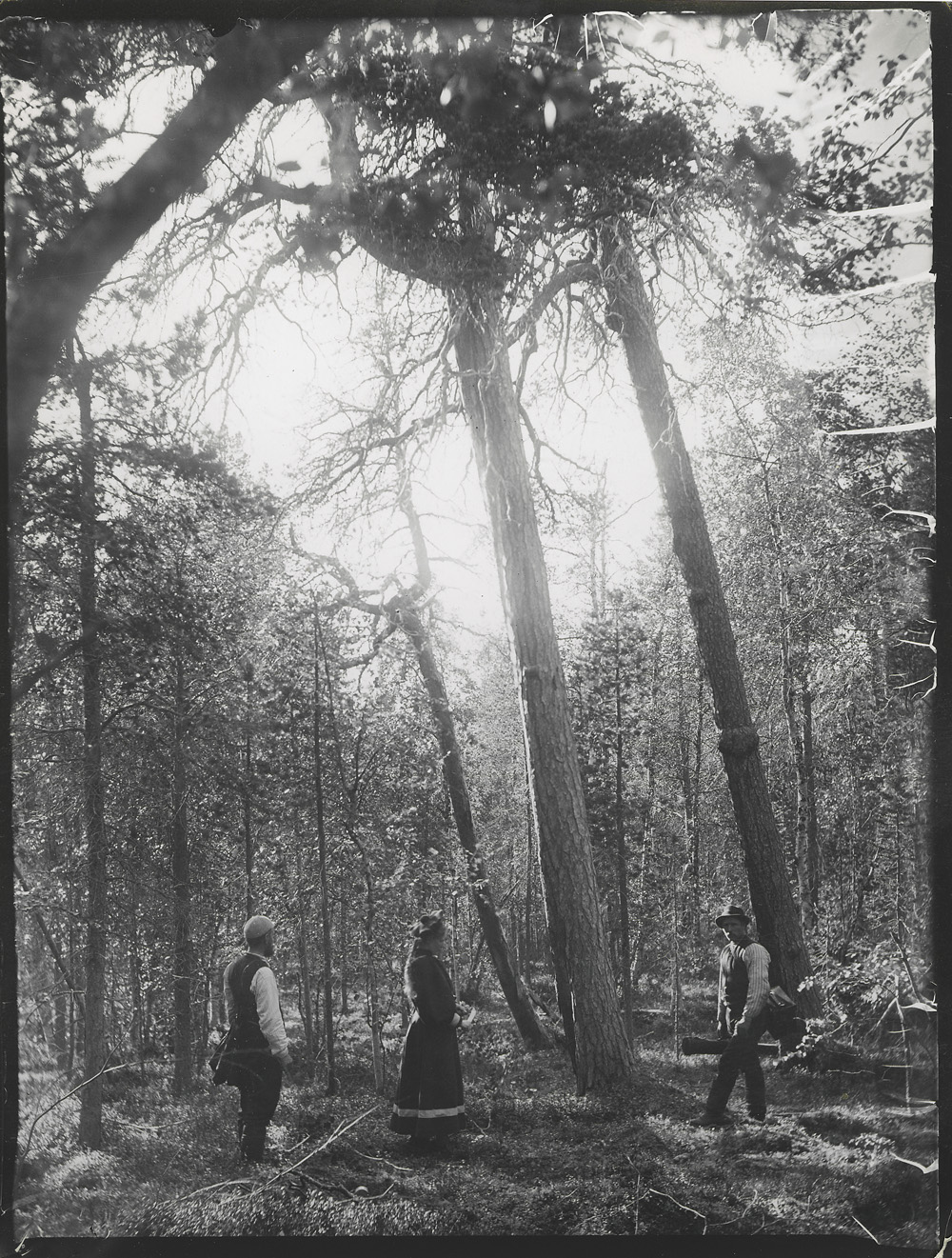 Wessel, Ellisif Rannveig Tre mennesker i furuskogen. Skogfoss i Passvikdalen. NMFF.002124